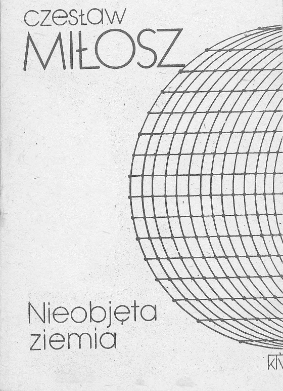 Krakowskie Towarzystwo Wydawnicze - Miłosz